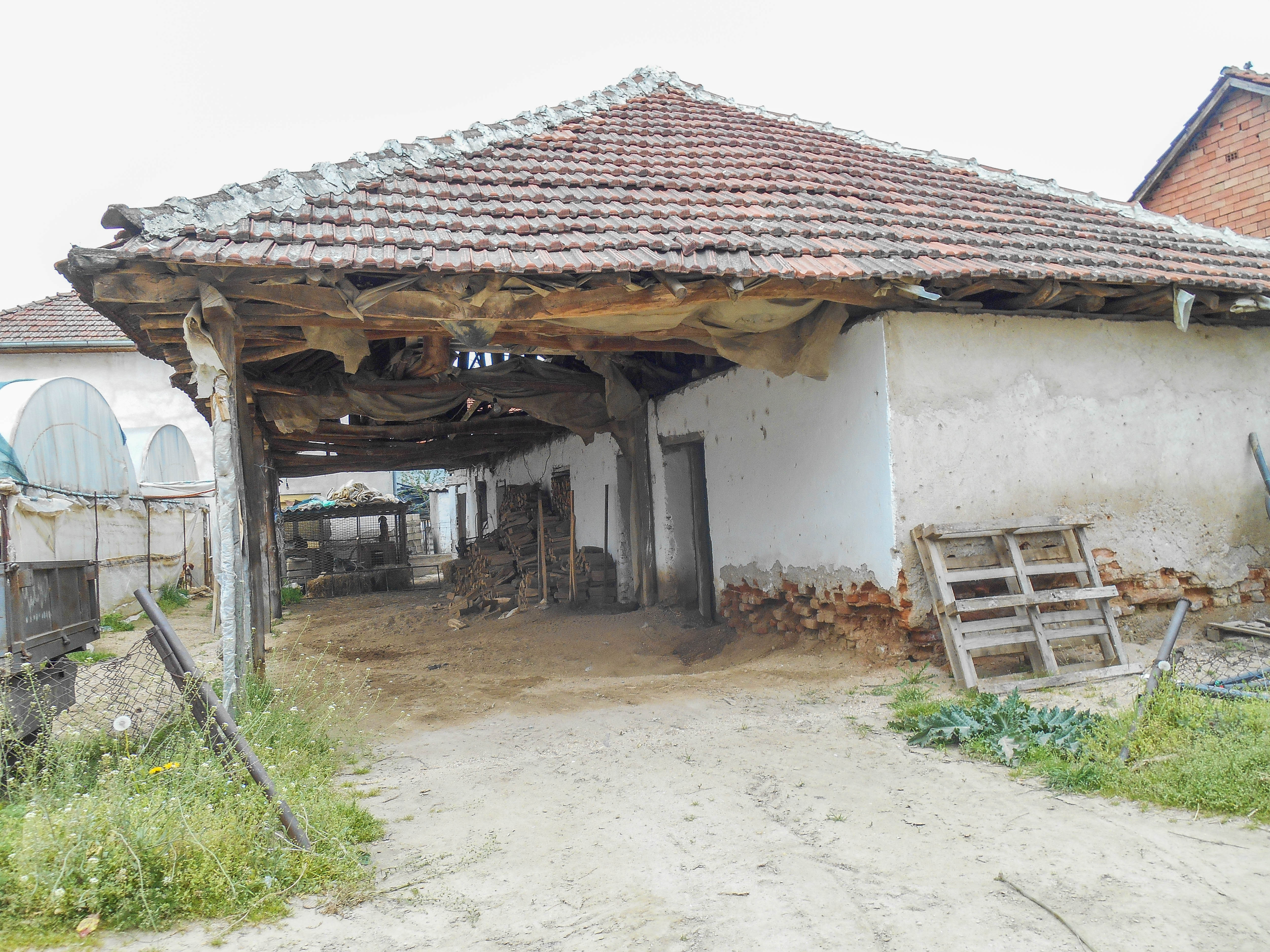 Стара куќа во селото